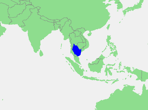 暹羅灣.